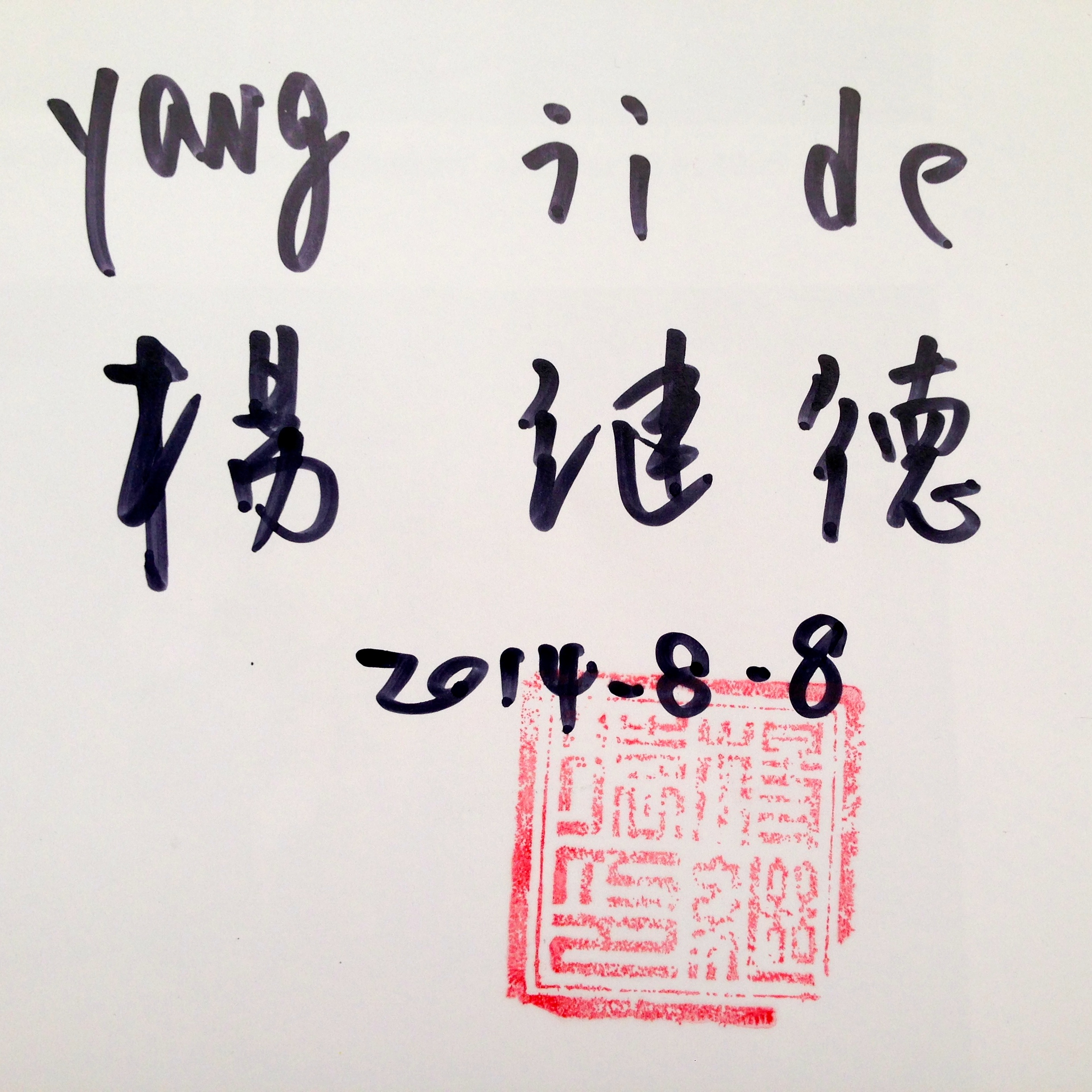 Namn och stämpel av bonden Yang Jide som tillskrivs upptäckten av Terrakottaarmén 1974.